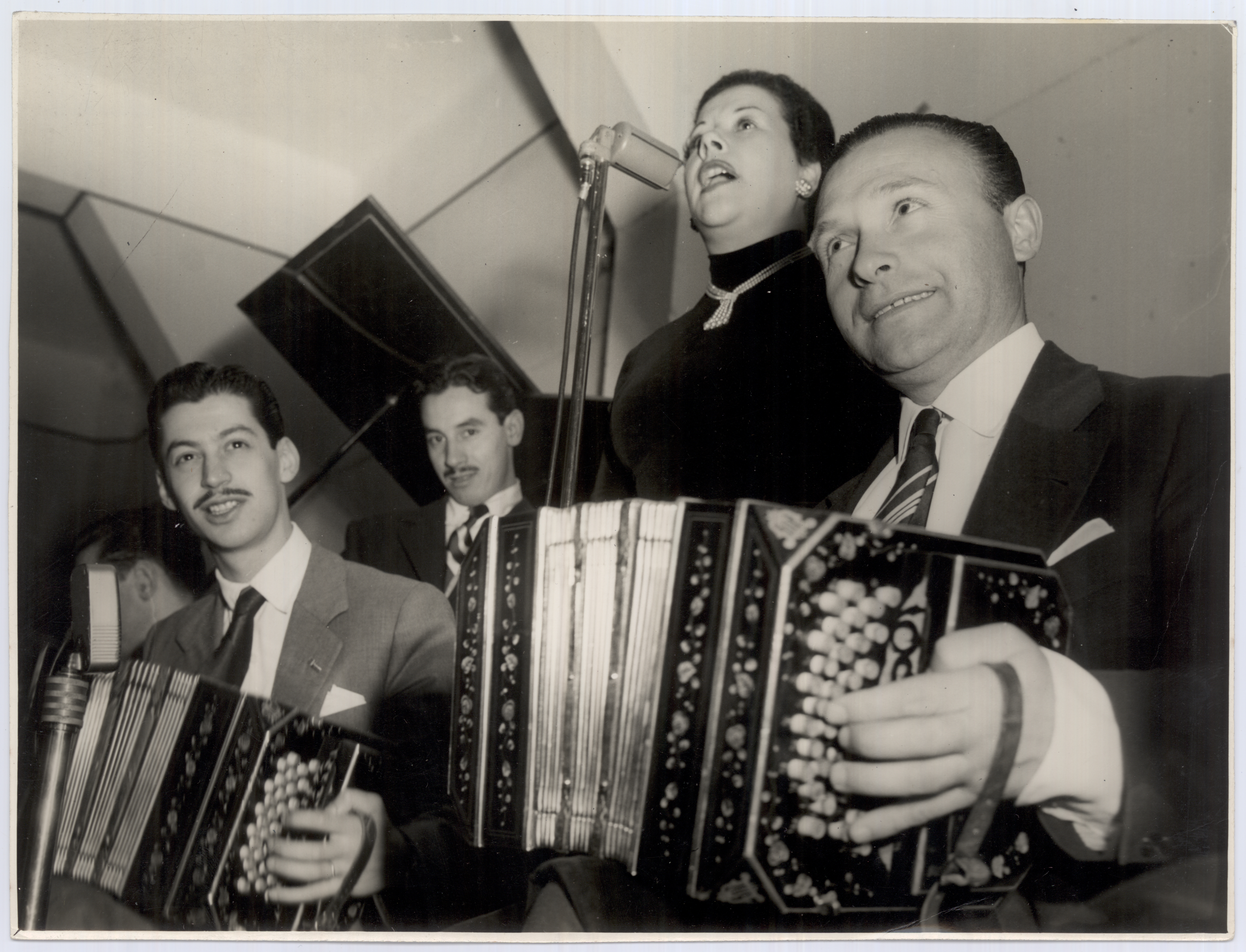 Orquesta de Donato Raciatti con la cantante Nina Miranda en un espectáculo en los salones del club Independencia de Trinidad (Flores). Editora: De Grandi.